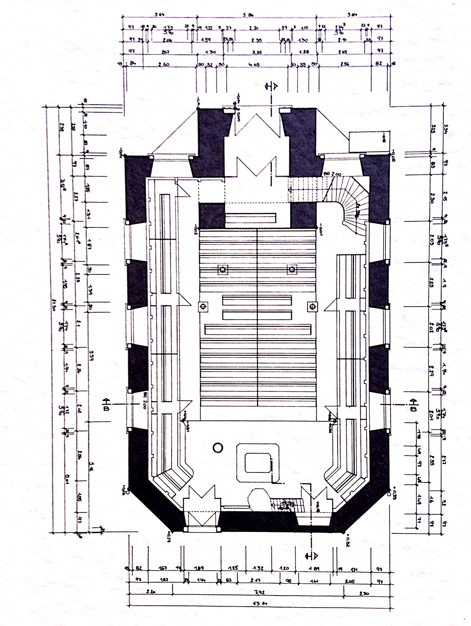 Stadtkirche Monschau Grundriss